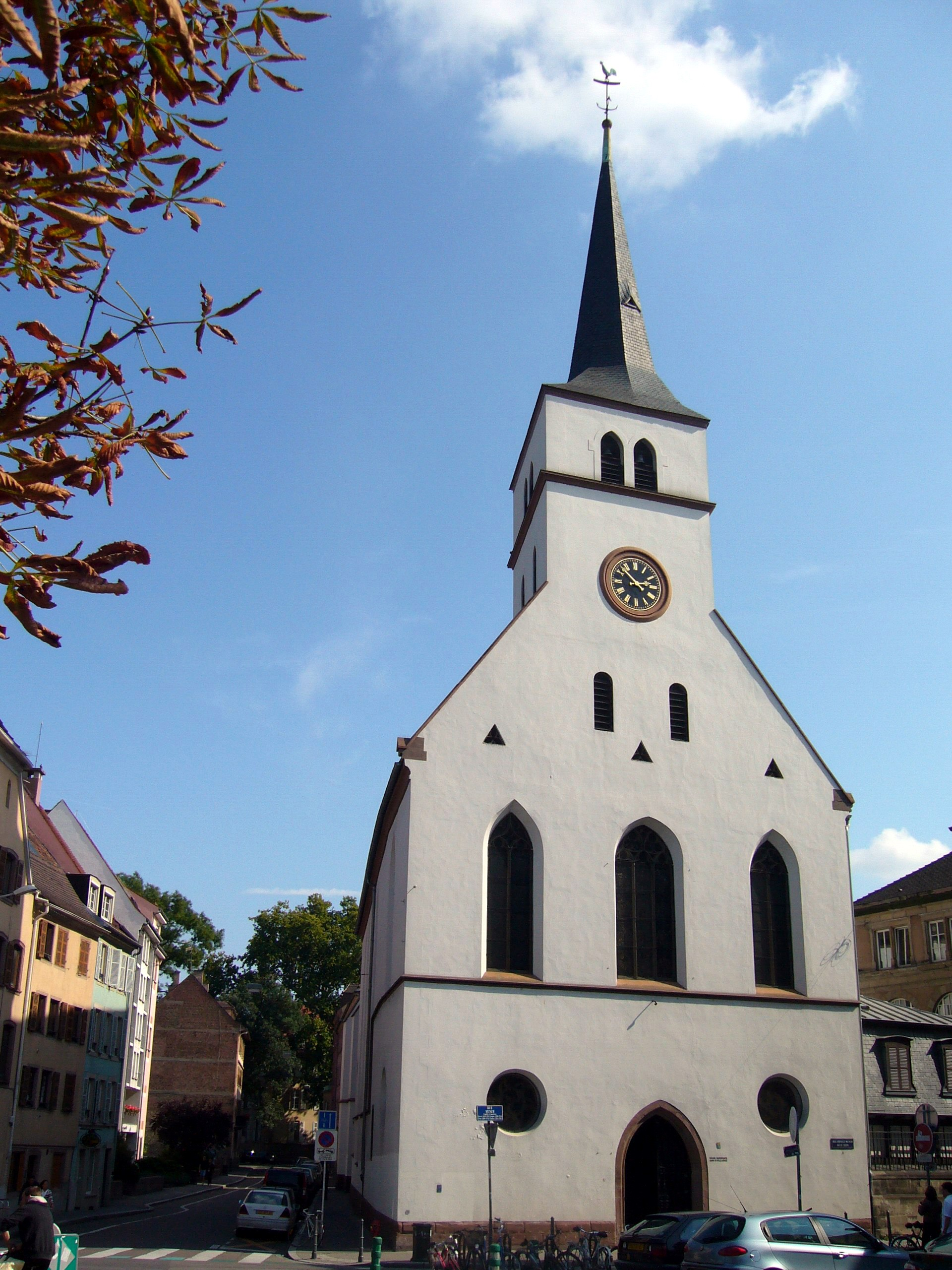 Eglise Saint-Guillaume